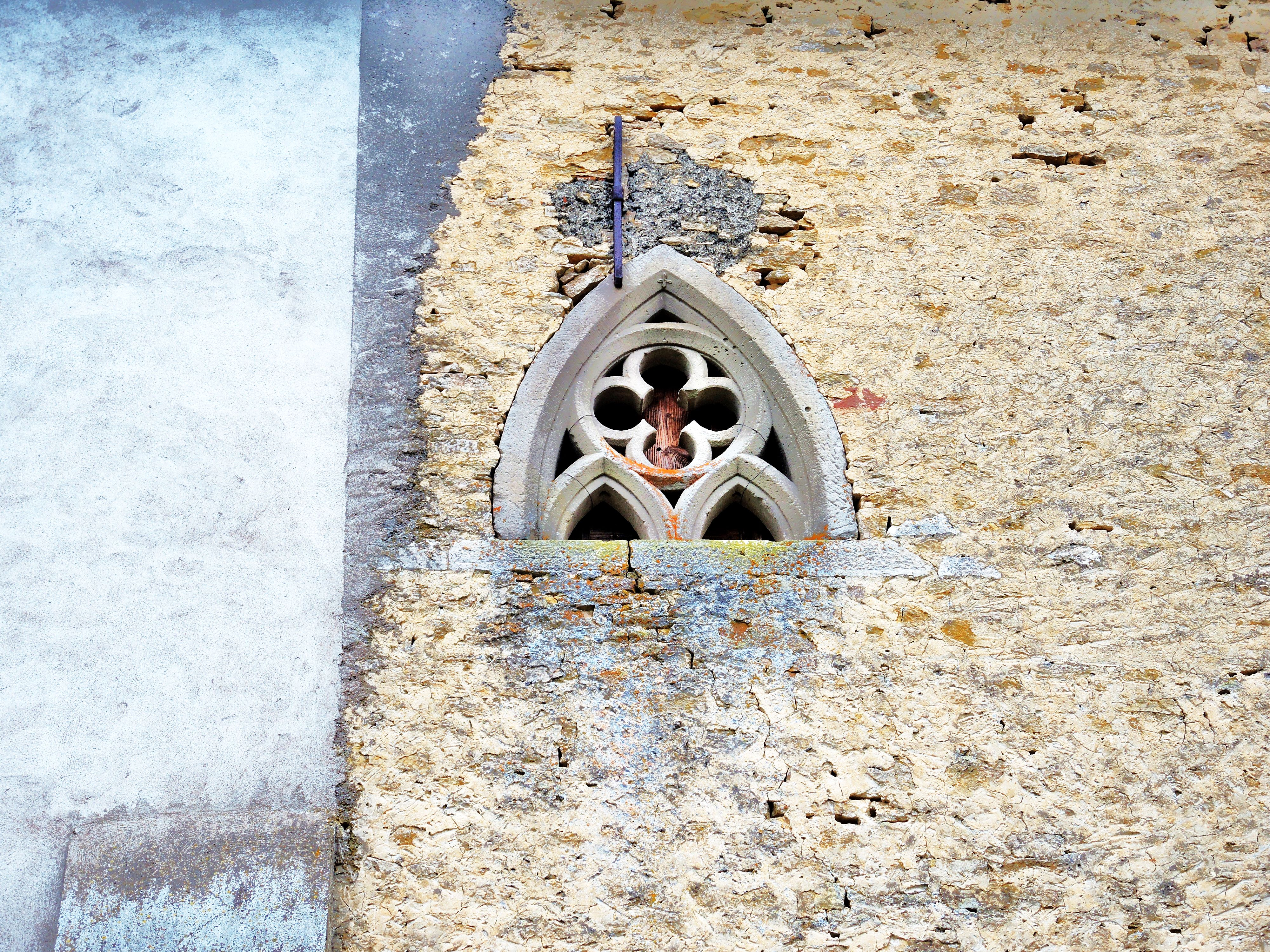 Fenestron de l'ancienne abbaye de Lieu-Croissant, ou des trois rois. Village de Mancenans. Département du Doubs. France.